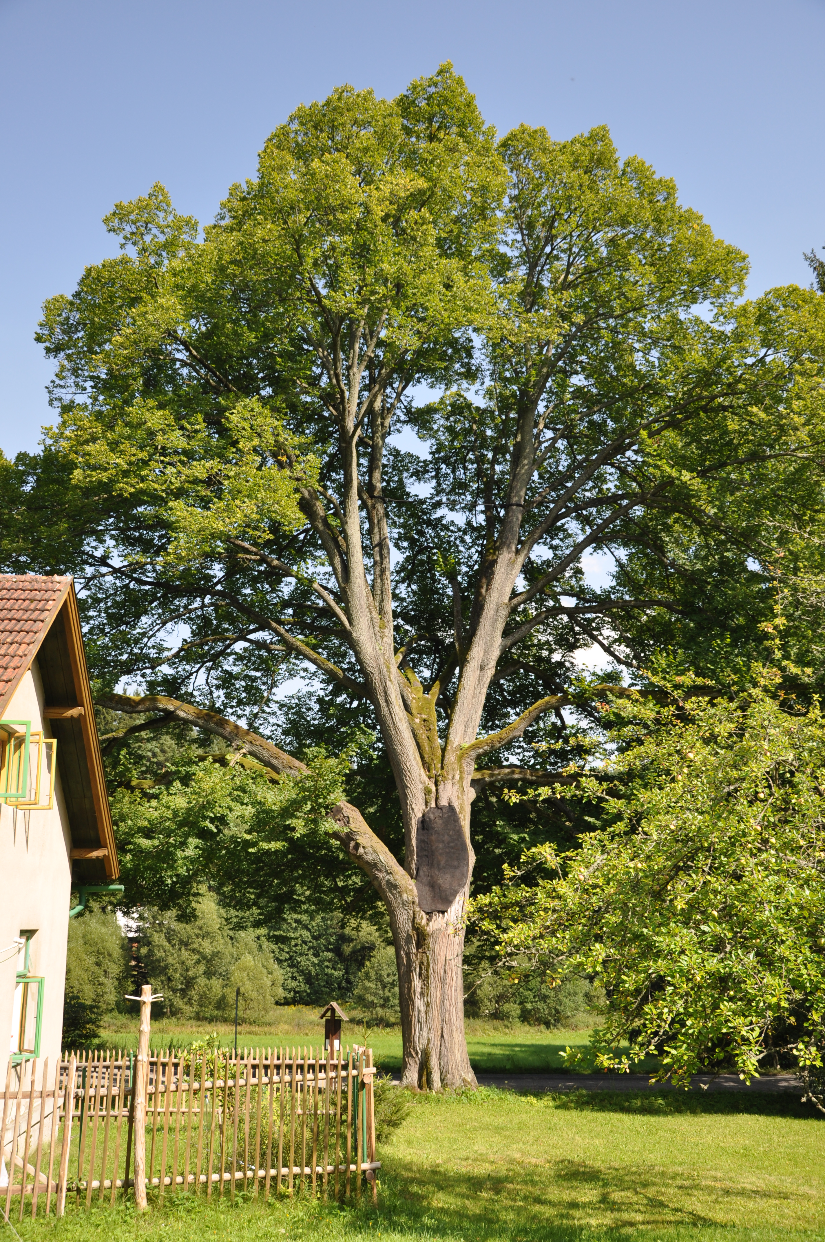 Drašarova lípa, Březiny